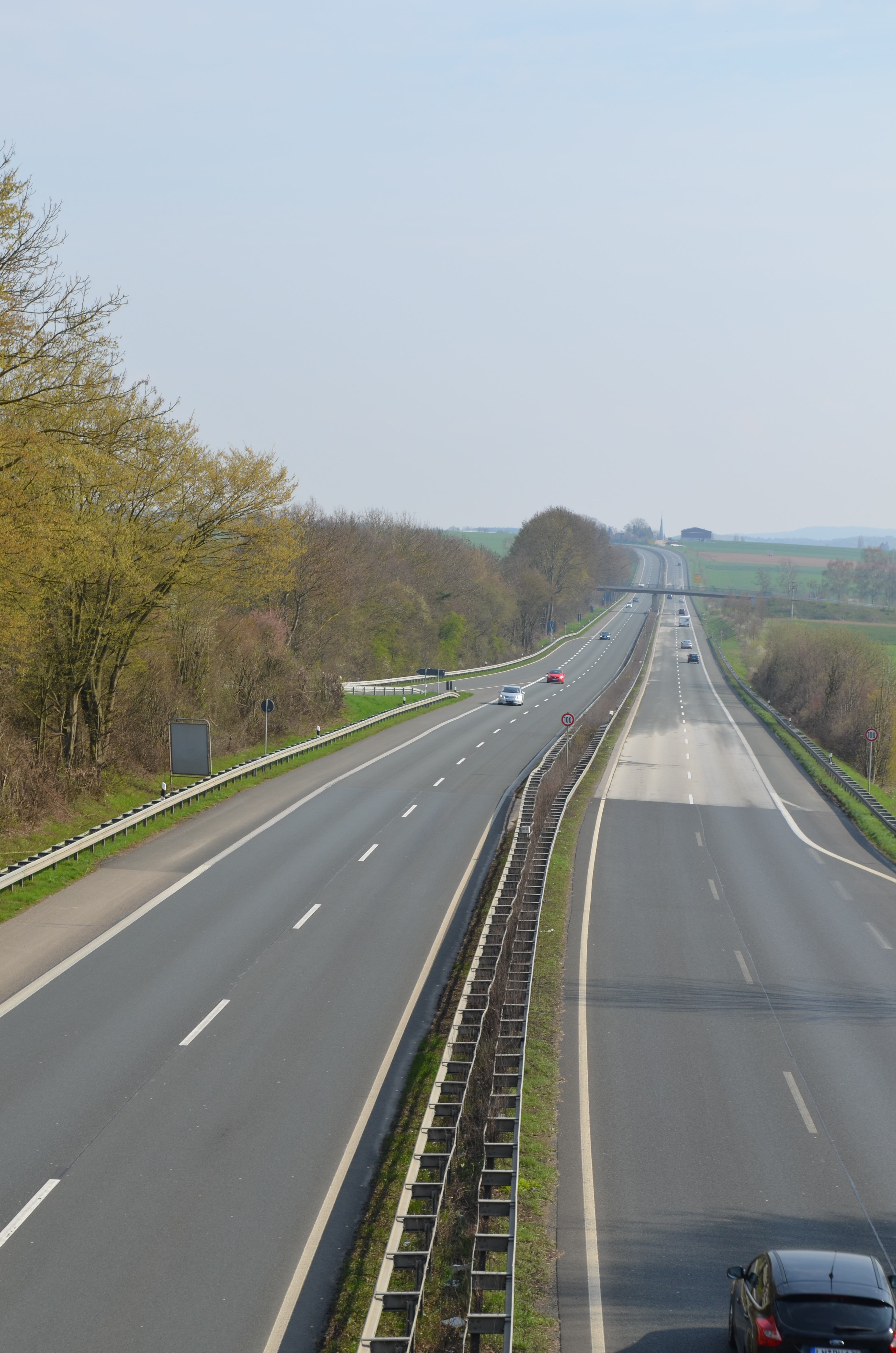 Lange Meil (Bundesstraße 49) im Landkreis Limburg-Weilburg, Richtung Obertiefenbach (Beselich)